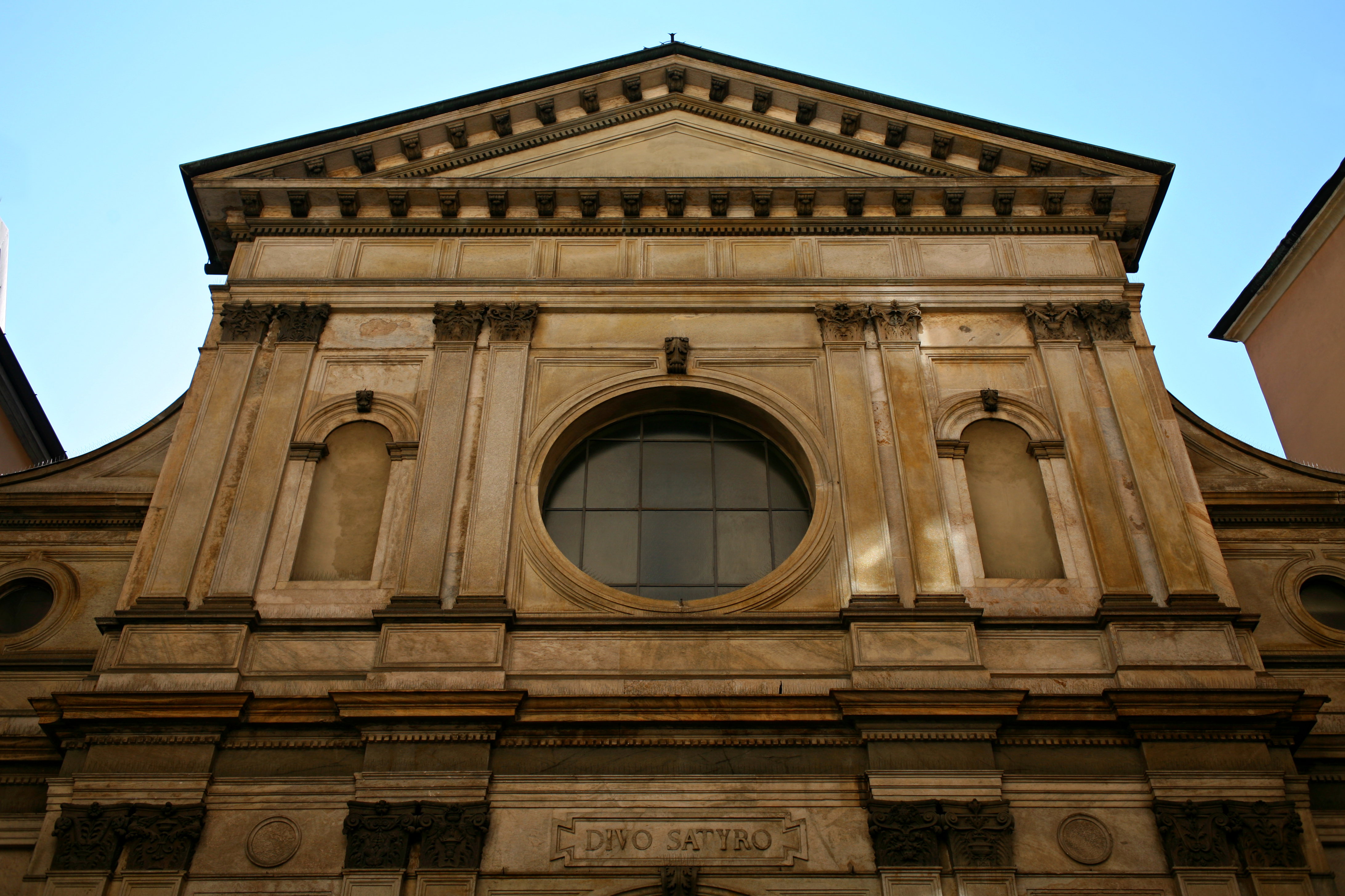 La chiesa di San Satiro a Milano nelle sue viste esterne e interne